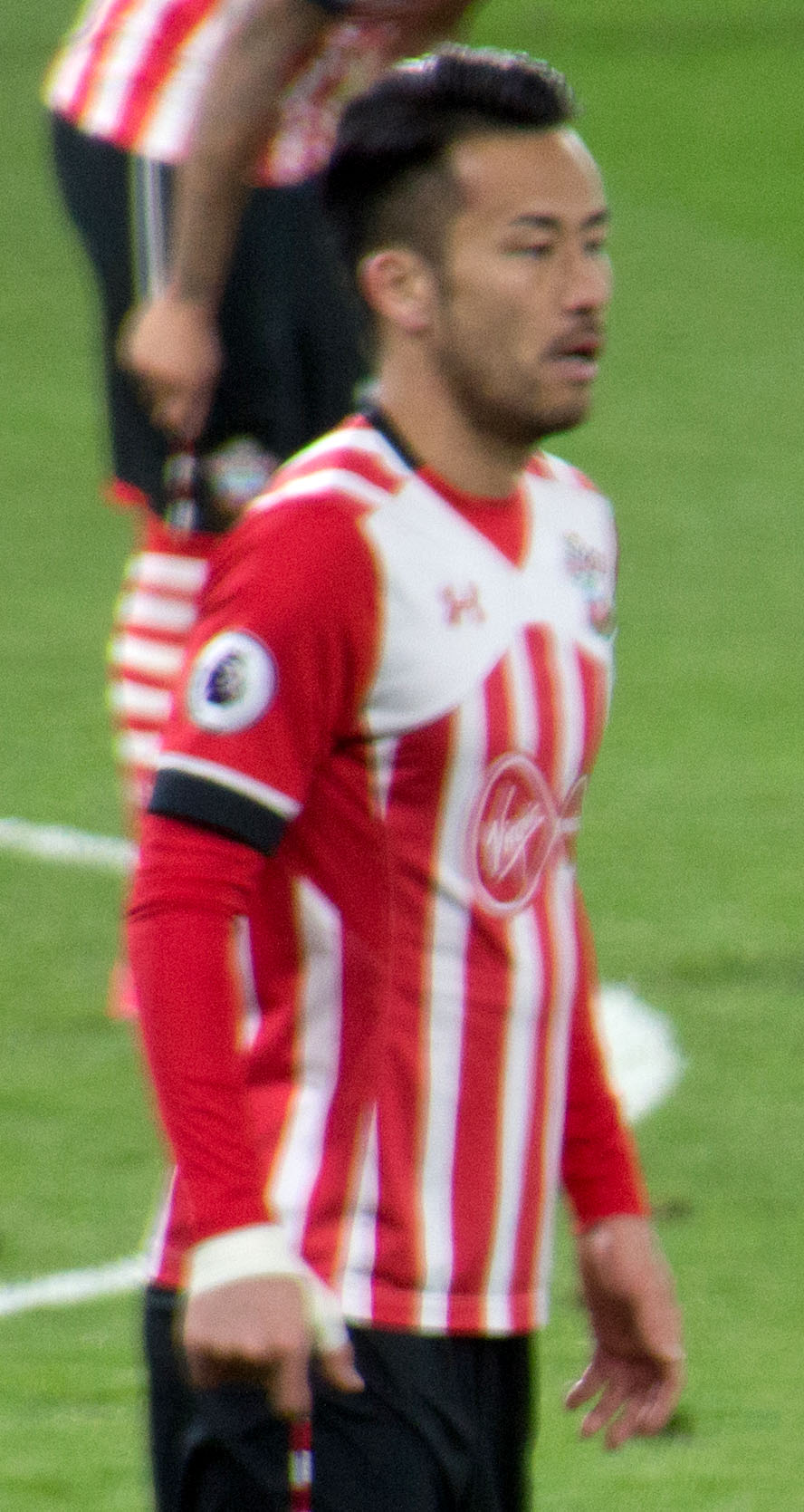 Maya Yoshida